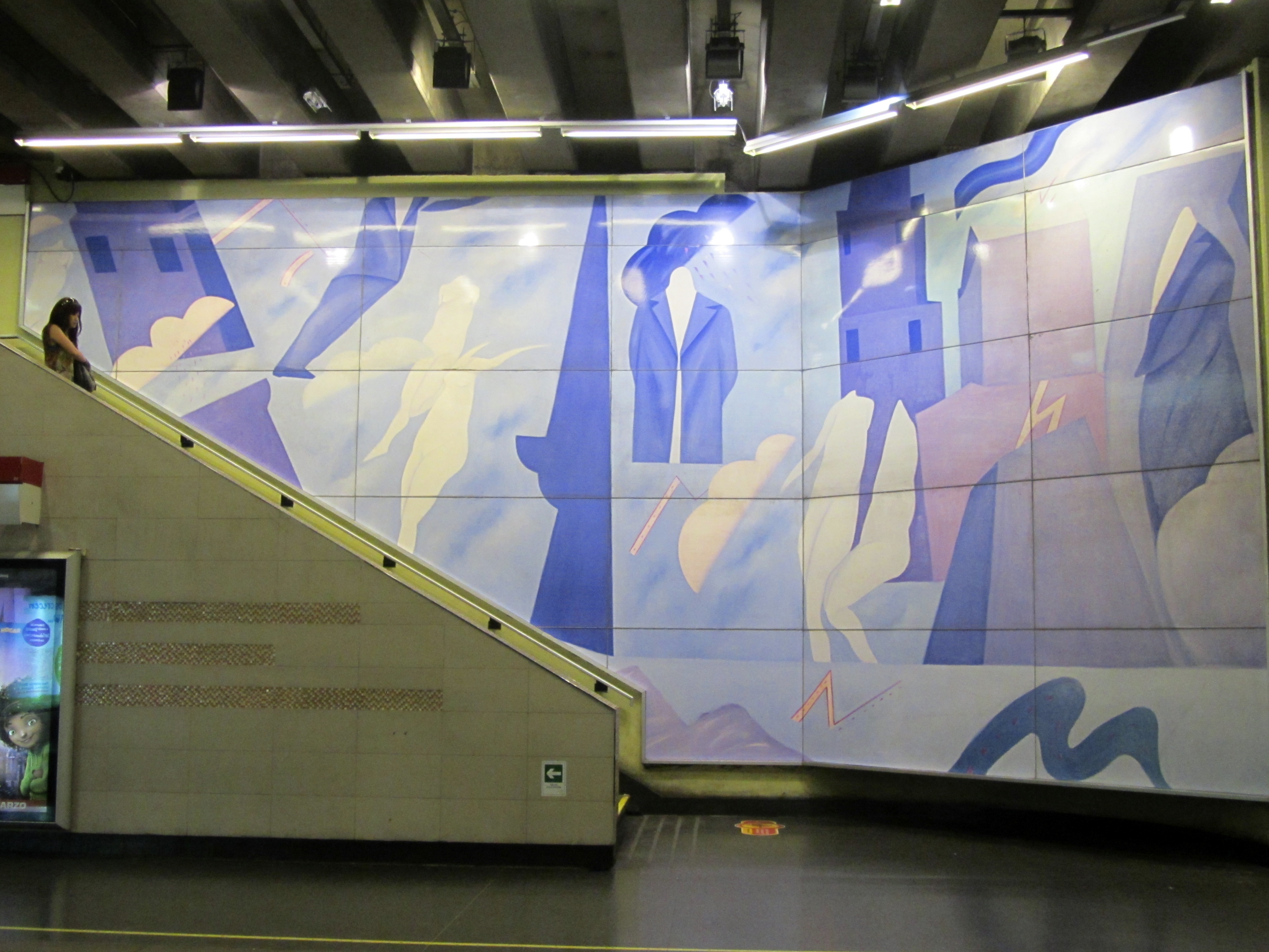 Imágenes de barrio, de Rodolfo Opazo, 2006, metro El Golf, Santiago de Chile